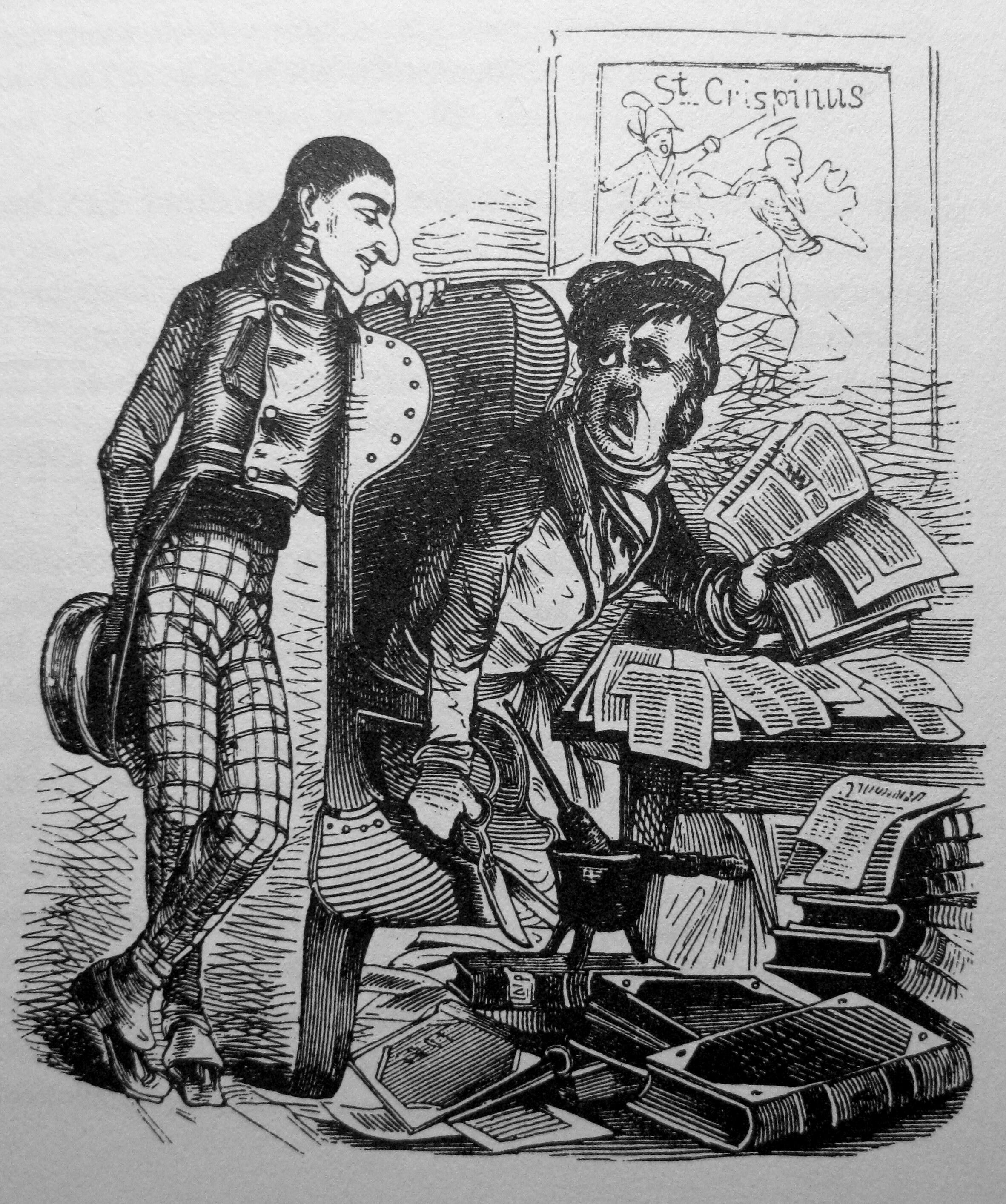 "Leuchtkugeln", Münchner Zeitschrift 1848-1850. Karikatur "Der Büchermacher". "Schauen's mein Bester, es ist zwar eine saure Arbeit, aber das Werk lobt den Meister." - "Erlauben Sie mir, was machen Sie denn da?" - "Eine Realenzyklopädie für das gebildete Deutschland."